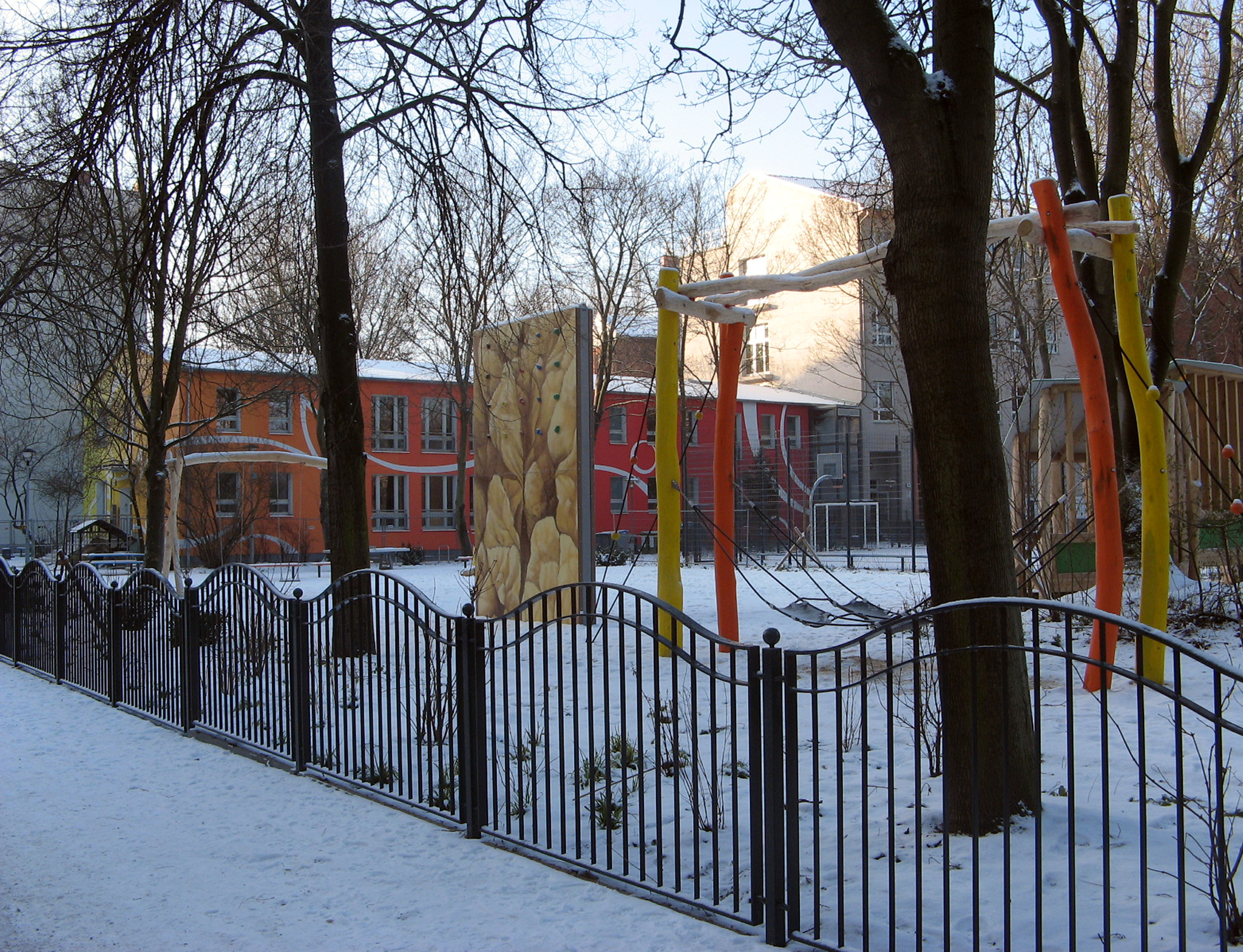 Das Regenbogenhaus in der Kadiner Straße 9, Berlin-Friedrichshain 2009 nach der Umgestaltung und der Anlage des neuen Spielgeländes nördlich von Vorgarten und Haus mit Tischtennisplatten, Trampolin, Schaukel, Kletterwand, Hängematten, Wasserspielplatz, Pavillon, einer großen Wiese und einem Bolzplatz. Im Vordergrund ist der neue Bogenzaun zu sehen, der das Gelände zur Kadiner Straße abgrenzt.